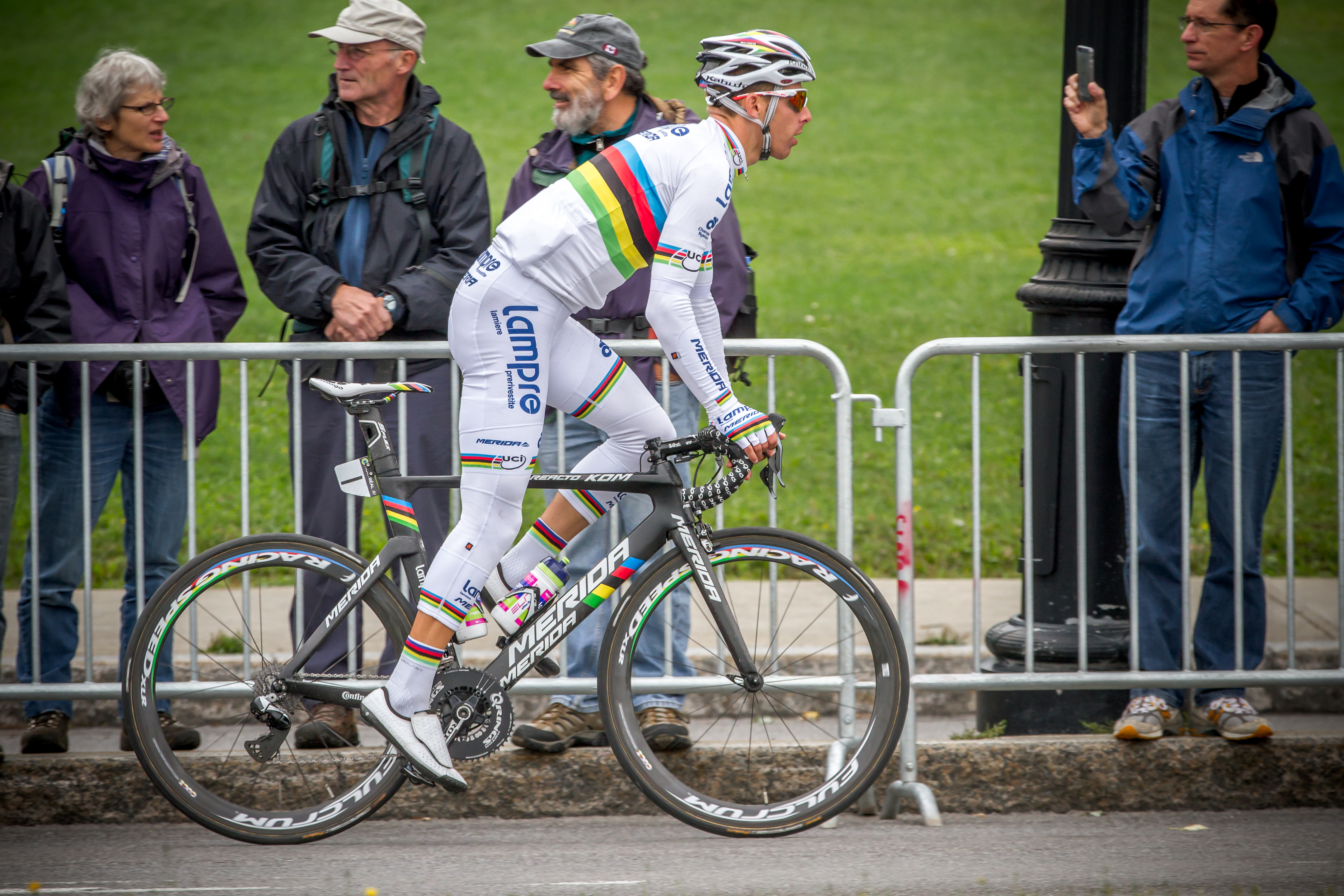 Rui Costa en el Gran Premio de Montreal 2014, con el maillot de campeón mundial.